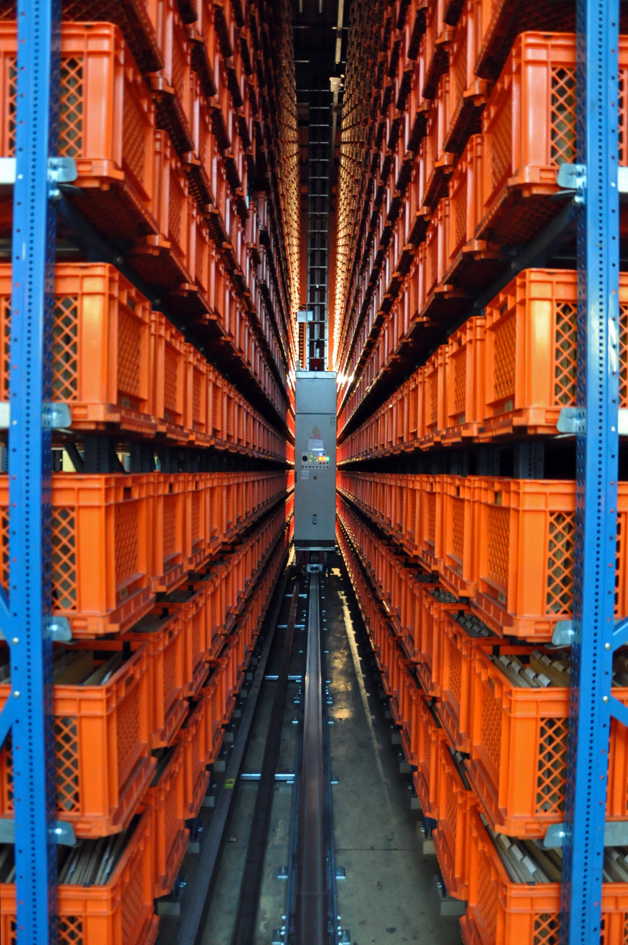 Biblioteka Śląska, magazyn automatyczny